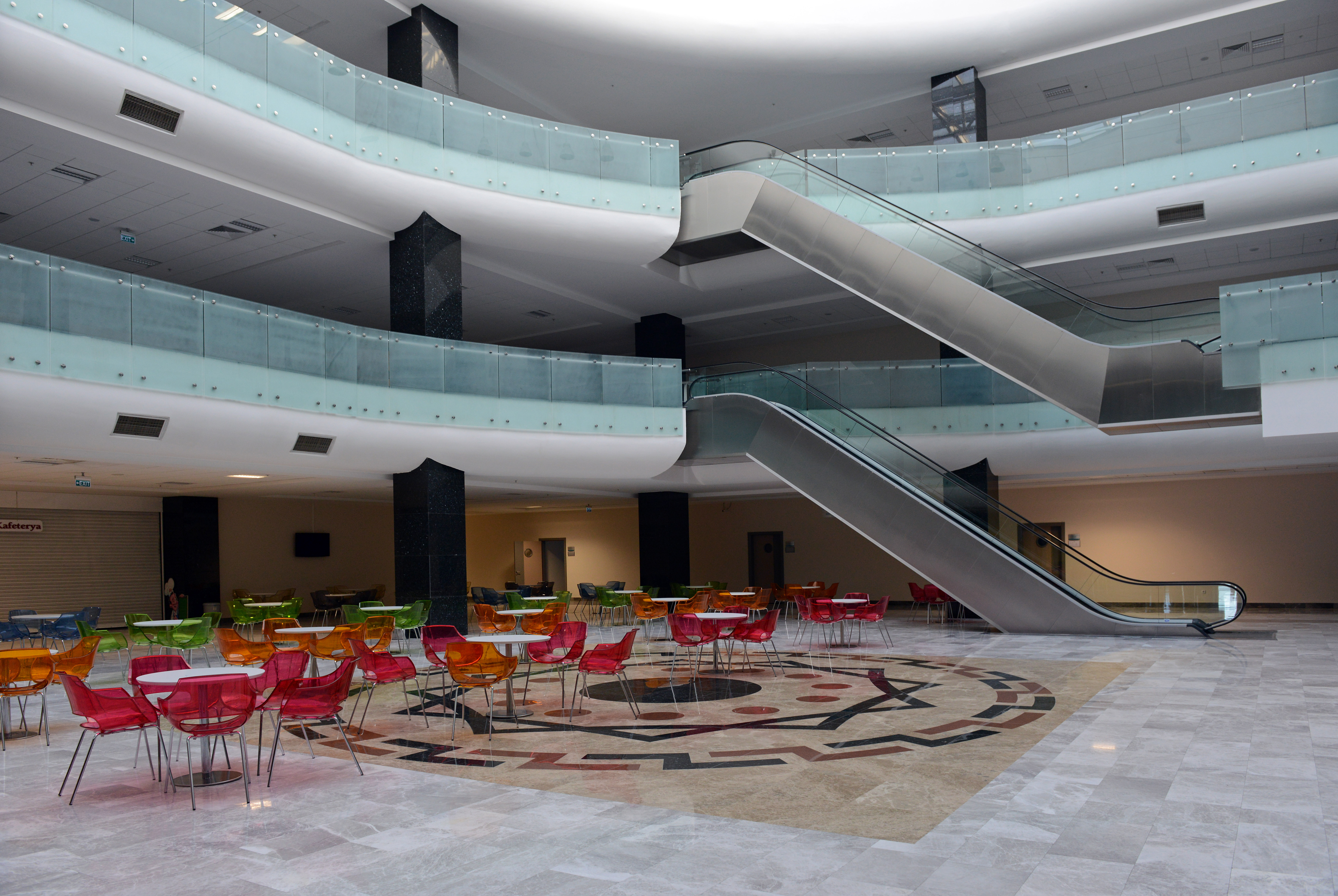 Mevlana Üniversitesi kafeteryasından görünüm.